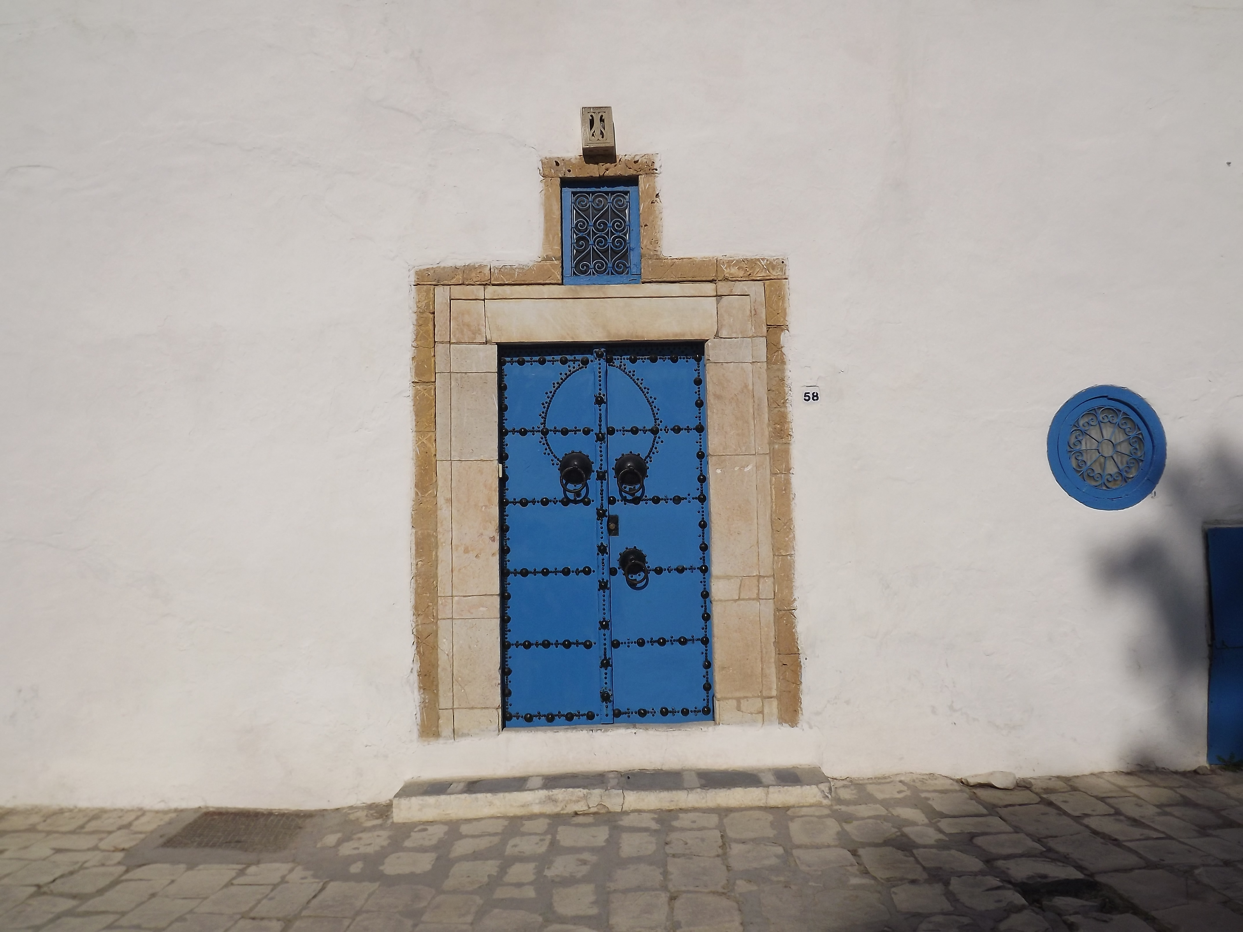 porte du Dar patout à sidi bou said